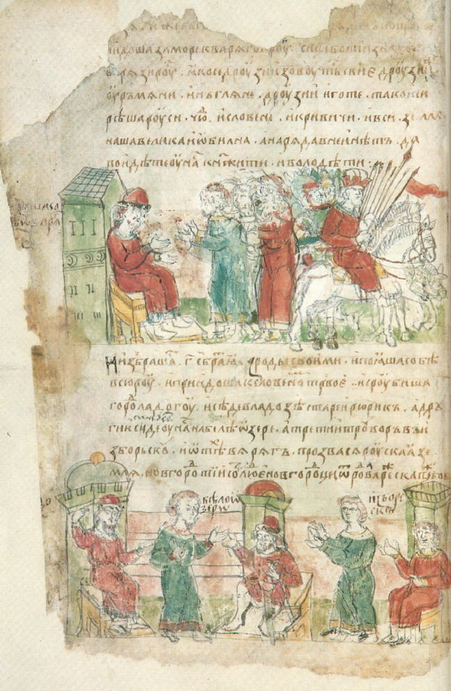 Радзивилловская (Кёнигсбергская) летопись.